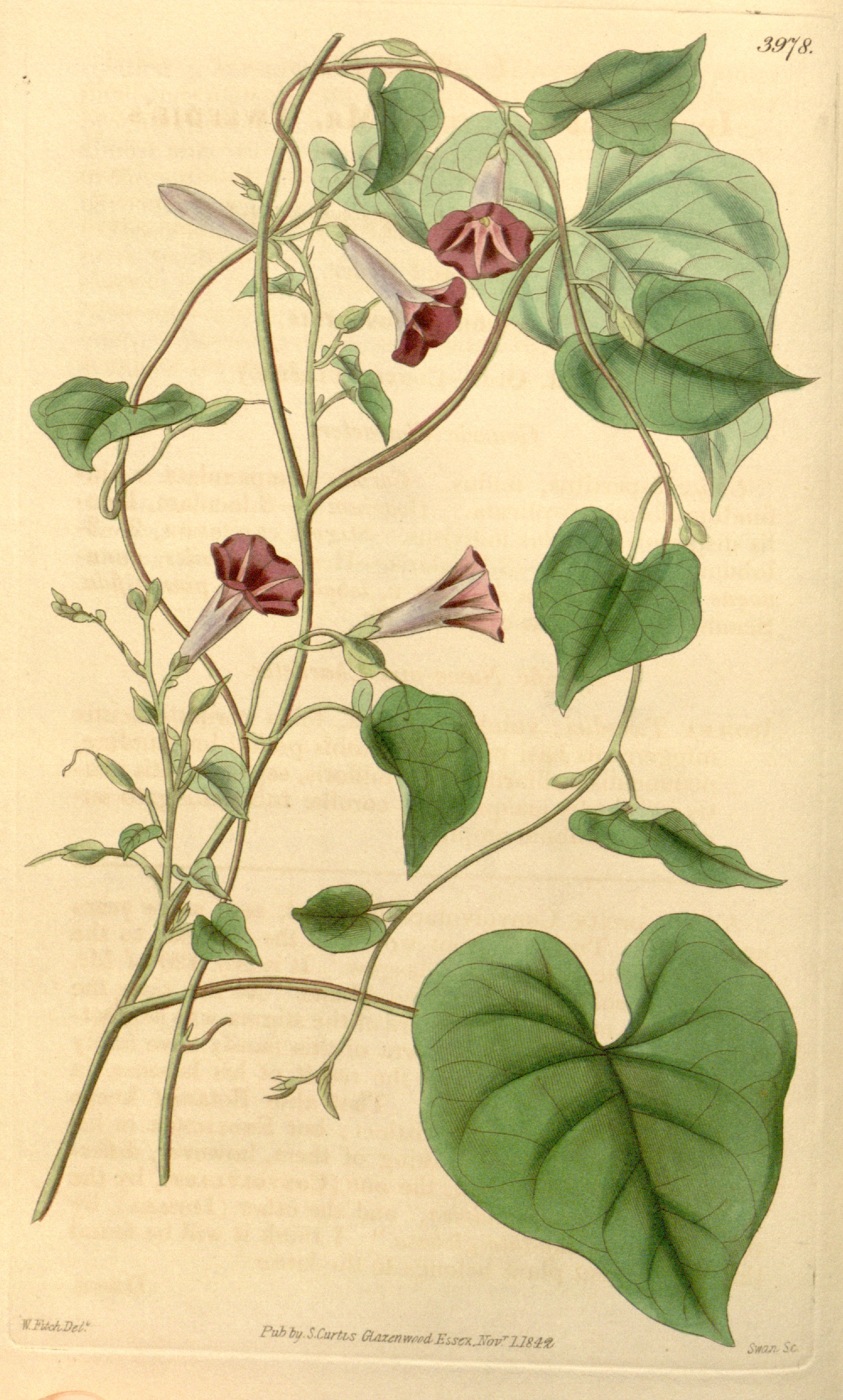 Ipomoea aristolochiifolia